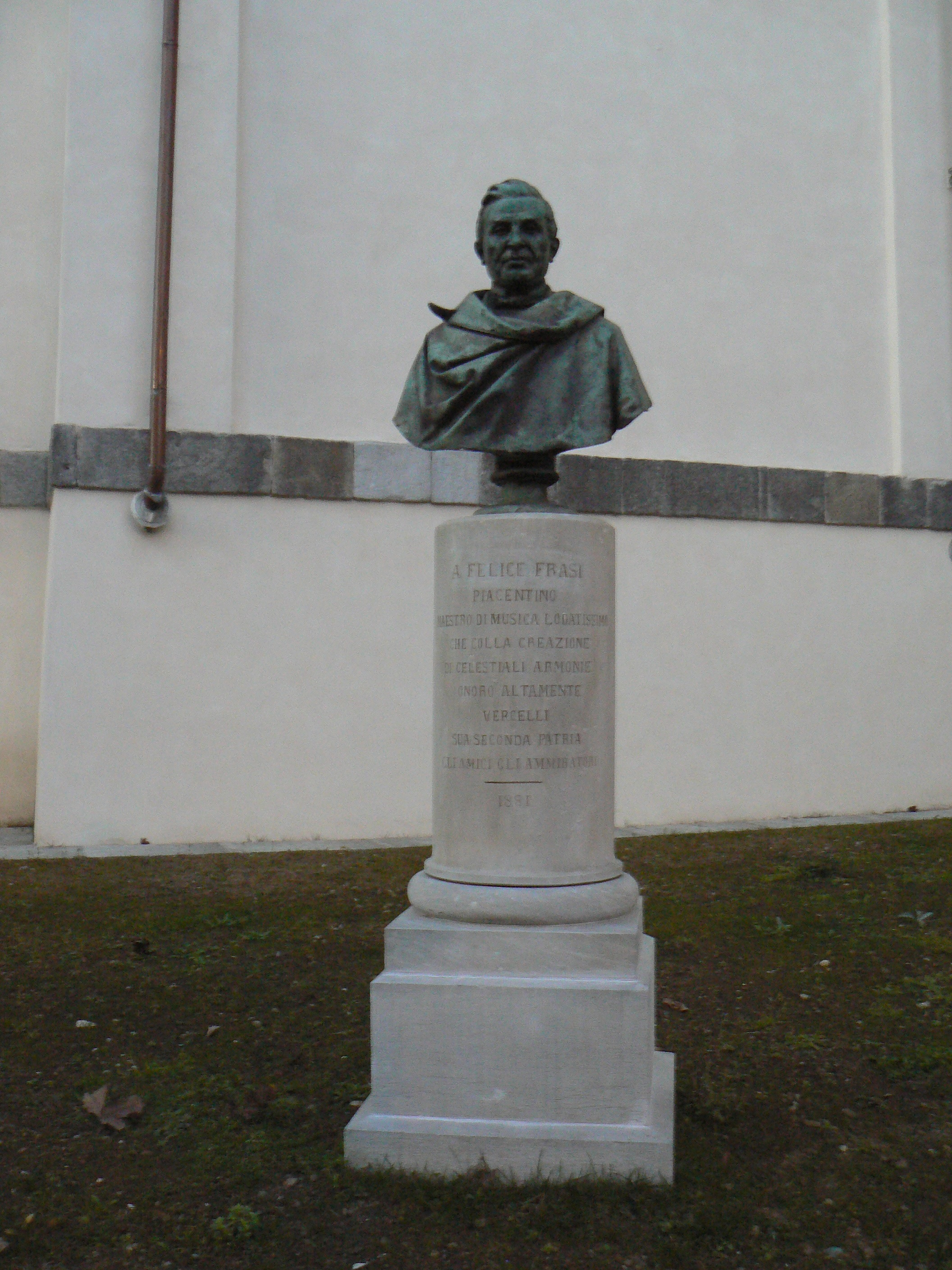 Busto lungo il fuanco della cattedrale di Sant'Eusebio, Vercelli.